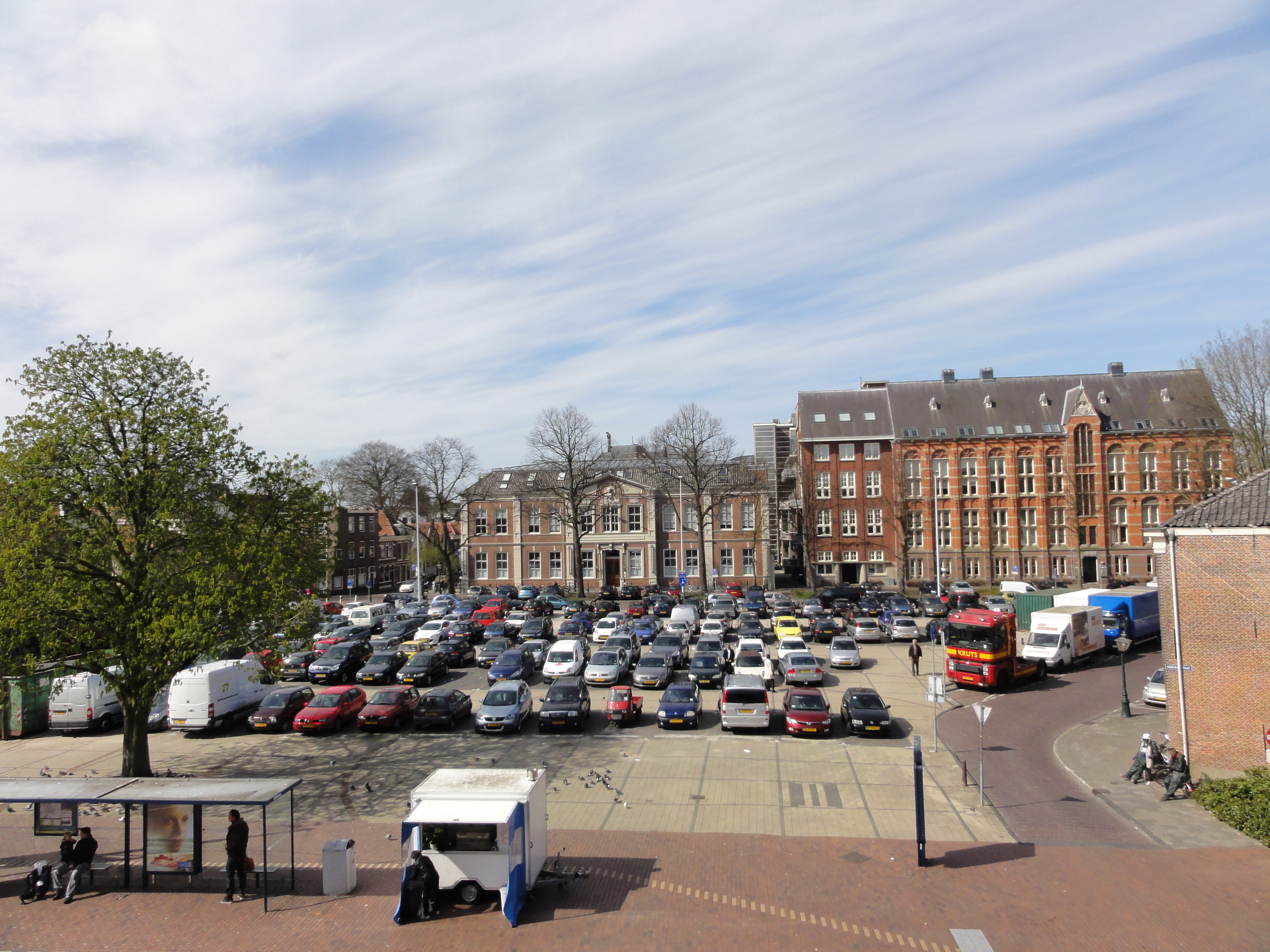 De Garenmarkt te Leiden op een drukke zaterdag